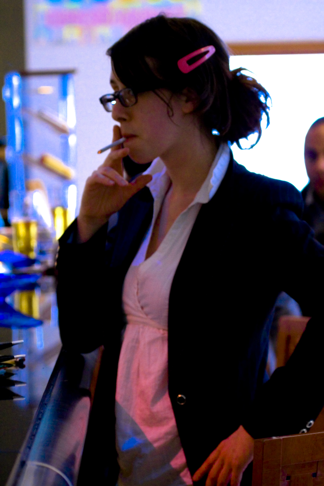 Becky Hogge